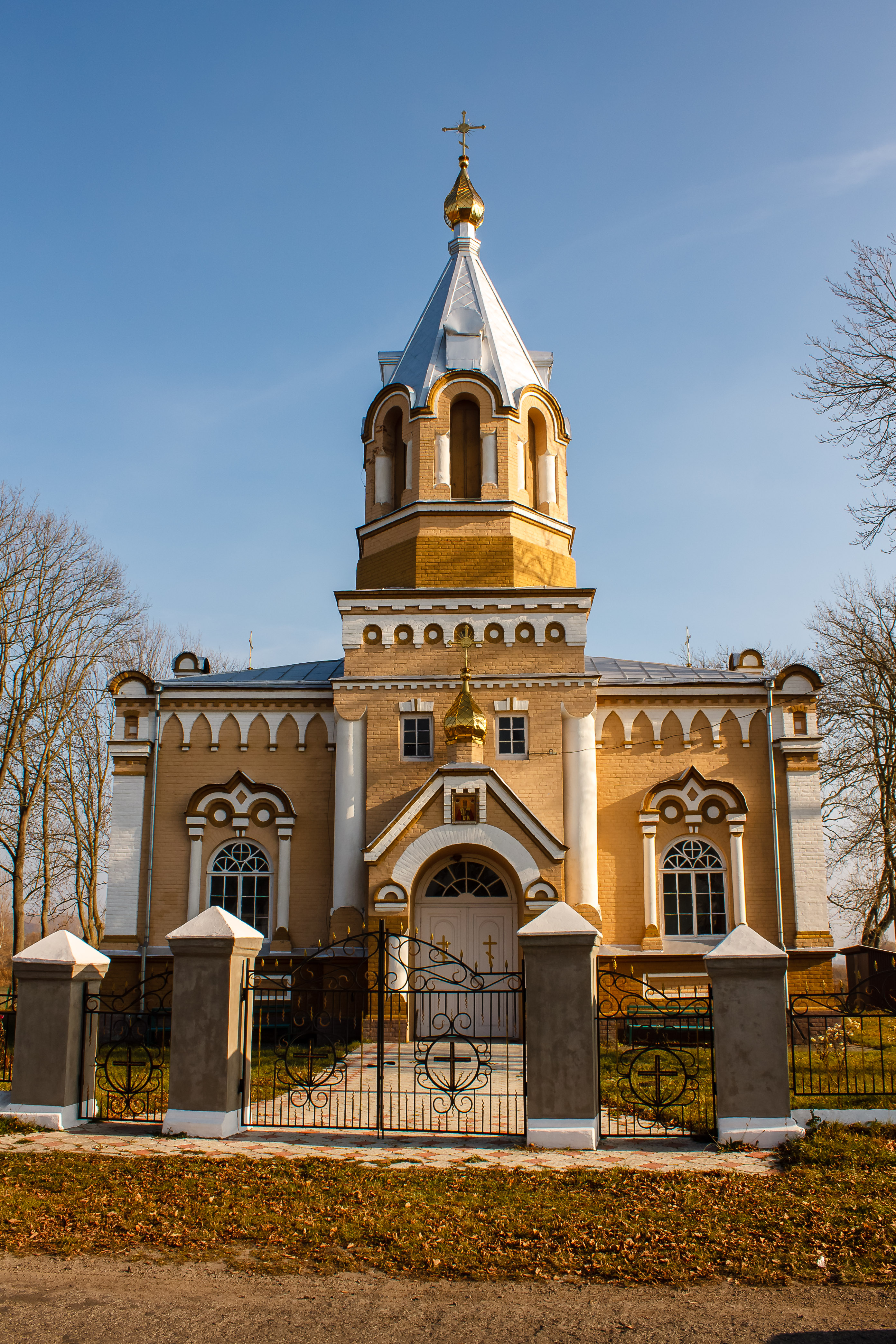 Миколаївська церква (мур.), с.Тростянець, На початку села